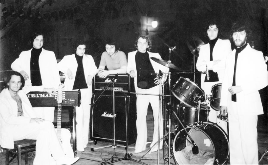 ГСН перед концертом на Олимпиаде 80. Слева направо: А.Слизунов, А.Федоров, И.Саруханов, С Намин, В.Живетьев, М.Файнзильберг, В.Васильев.